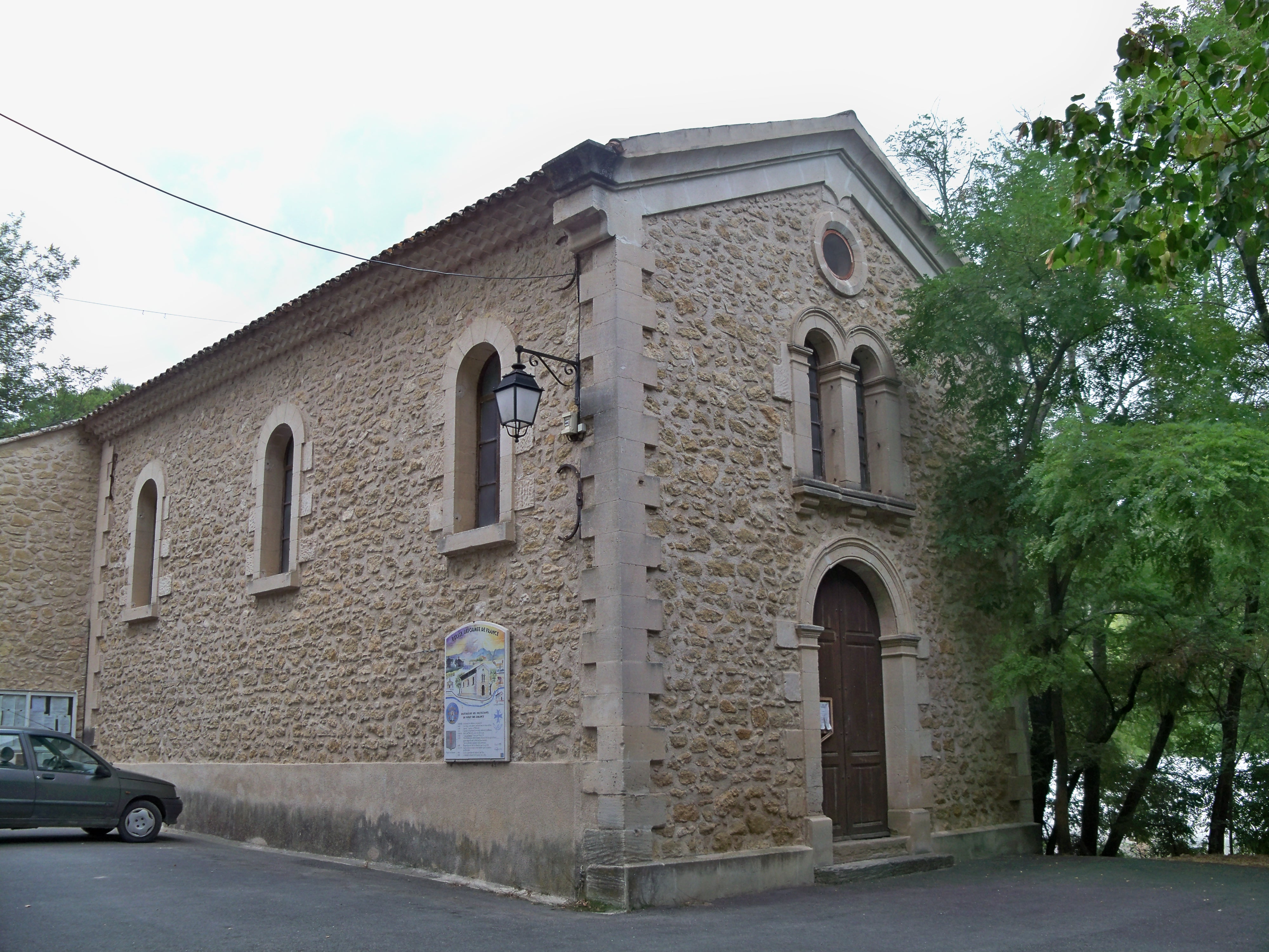 Temple protestant de Puget sur Durance, Vaucluse, France